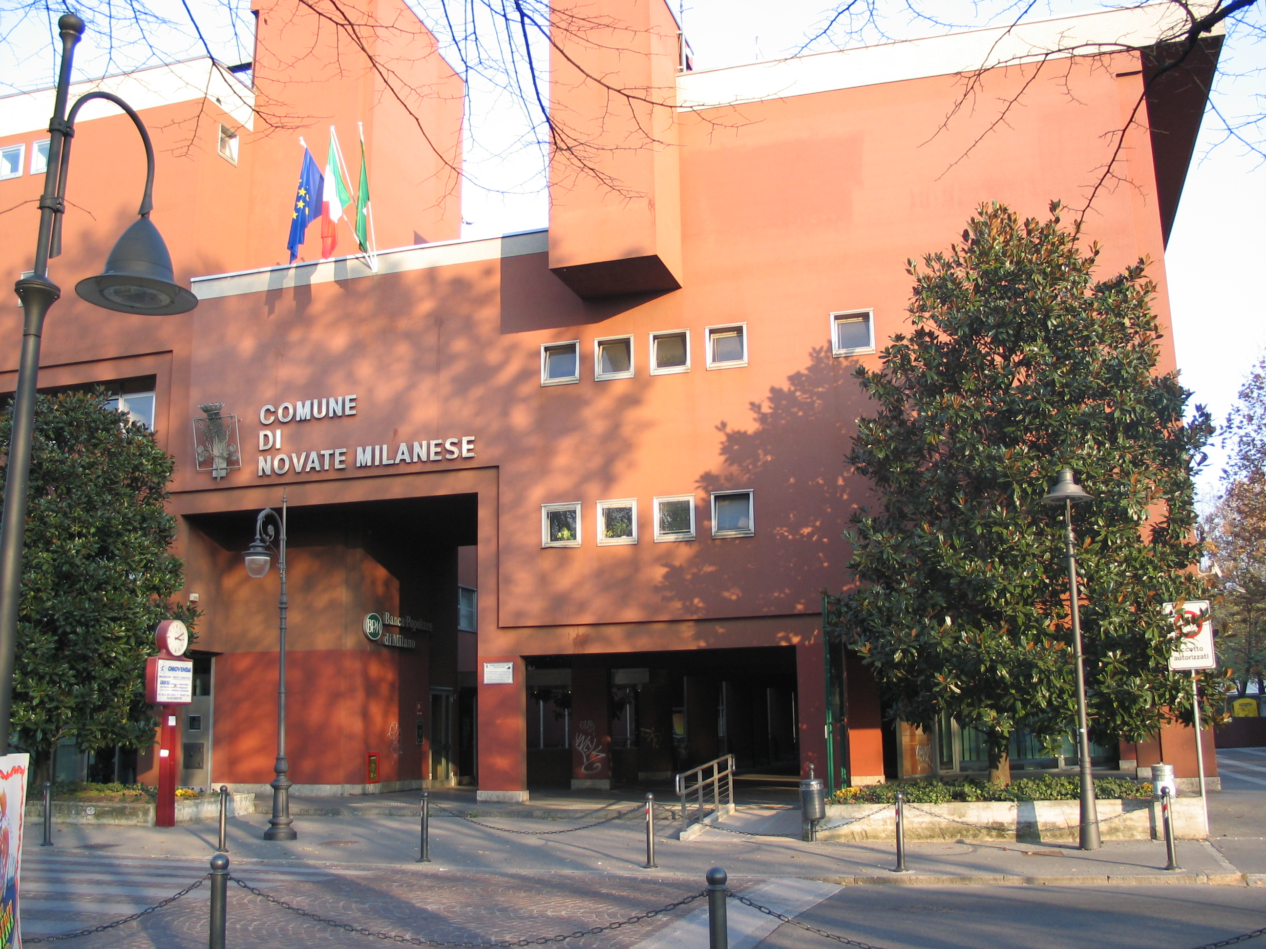 Municipio di Novate Milanese Novate Milanese Town Hall